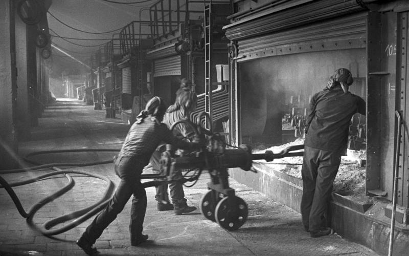 Lauta, Aluminiumwerk ADN-ZB/Weisflog 9.2.89 Bez. Cottbus: Wettbewerb Im Aluminiumwerk "Albert Zimmermann" Lauta wurde im zurückliegenden Jahr ein Rohkohleäquivalent von über 335.000 Tonnen eingespart. Diese Summe würde ausreichen, das Großkraftwerk Boxberg vier Tage lang zu betreiben. Qualitätsarbeit der Kollegen des Anodendienstes an den Öfen trug mit zu diesem Ergbnis bei. Die Aluminiumherstellung gehört weltweit zu den energieaufwendigsten Prozessen. In diesem Jahr wollen die Kollektive der Lautaer Hütte insgesamt 1.600 Megawattstunden Elektronenergie einsparen.